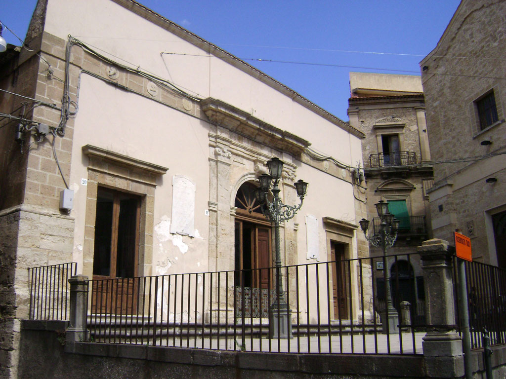 Mineo: Circolo di Cultura Luigi Capuana